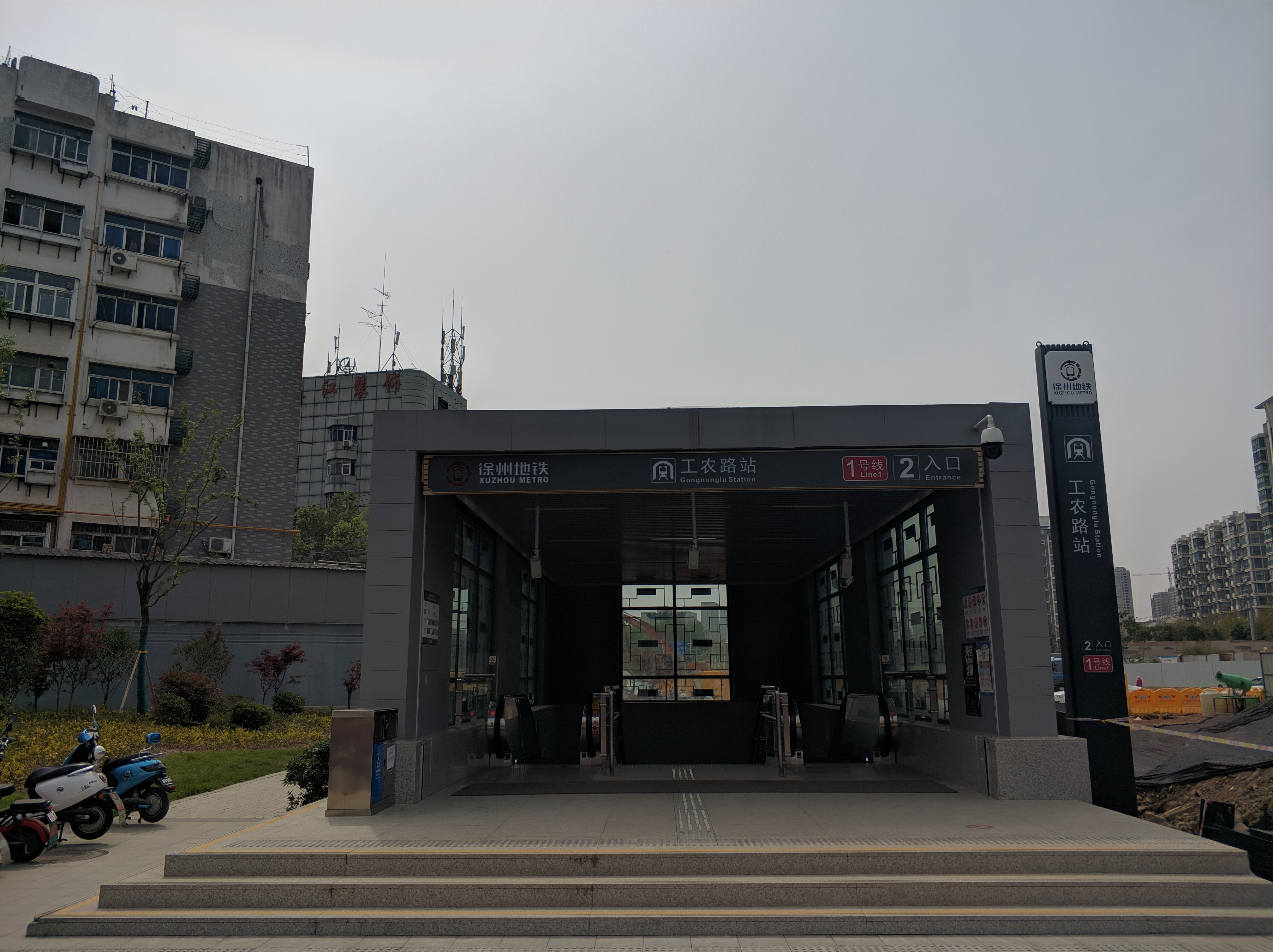 徐州地铁工农路站2号出入口